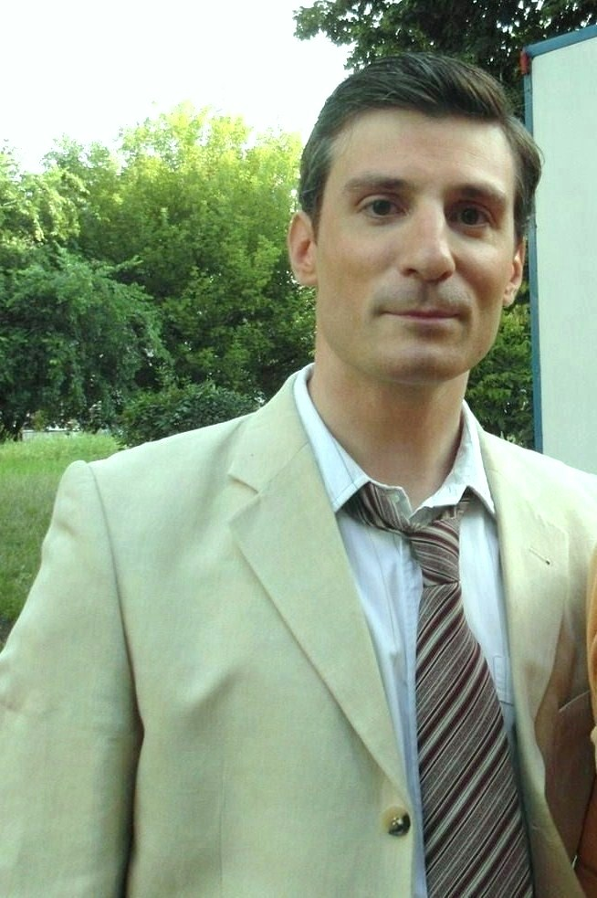 Szymon Czacki jako Seweryn Steinwurzel na planie serialu "Bodo".